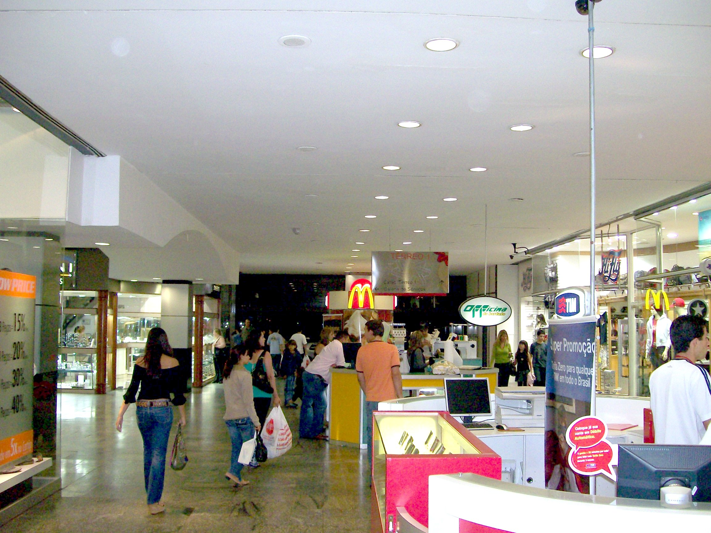 Entrada do Shopping Flamboyant